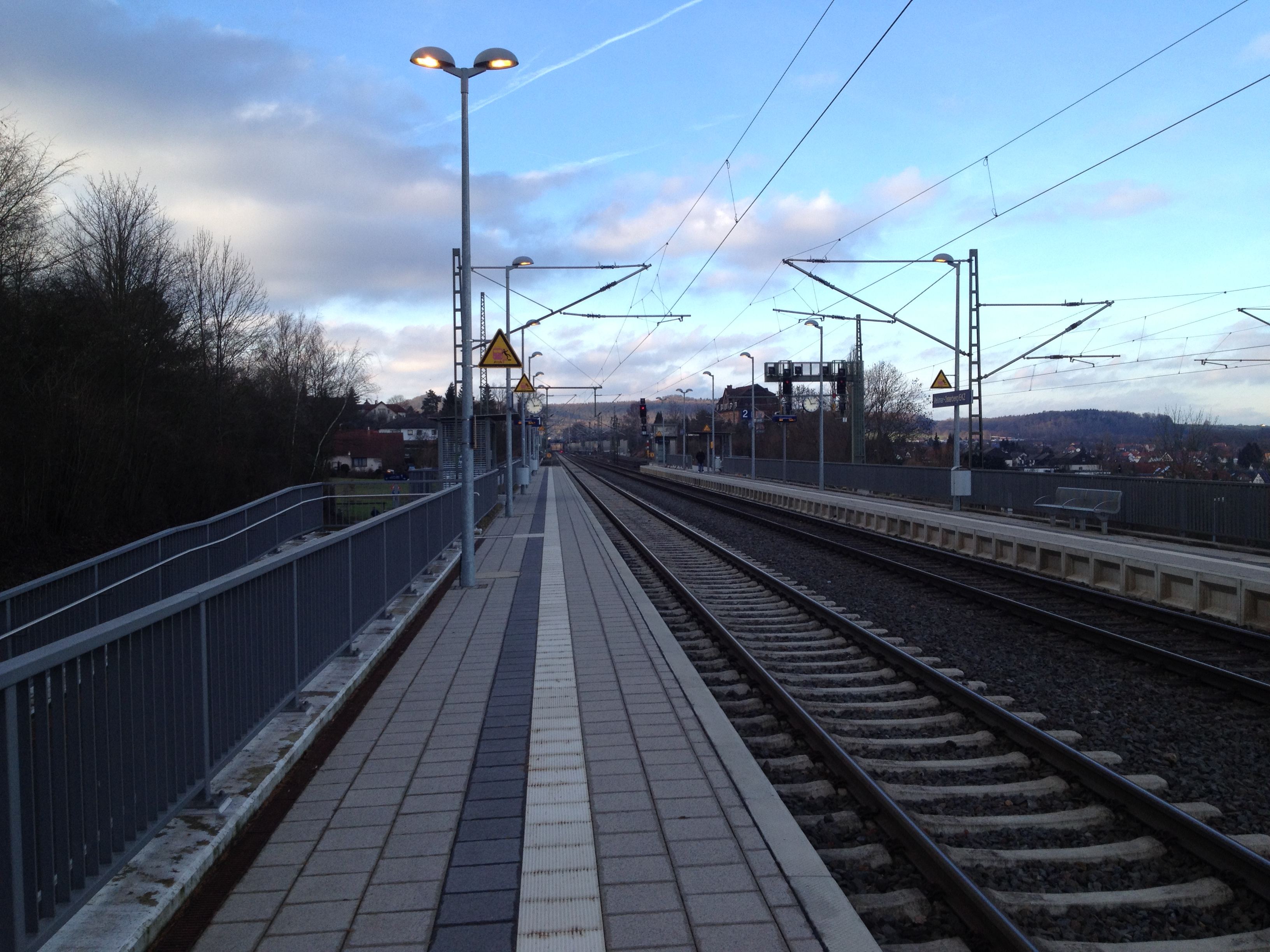 Der Bahnhof Vellmar-Osterberg/EKZ, im Hintergrund der Bahnhof Vellmar-Obervellmar